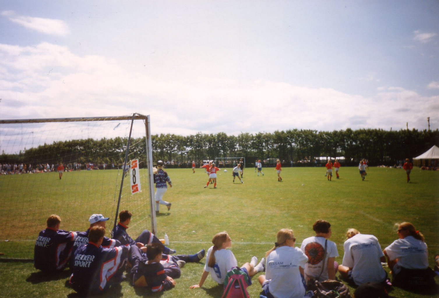 Dana Cup